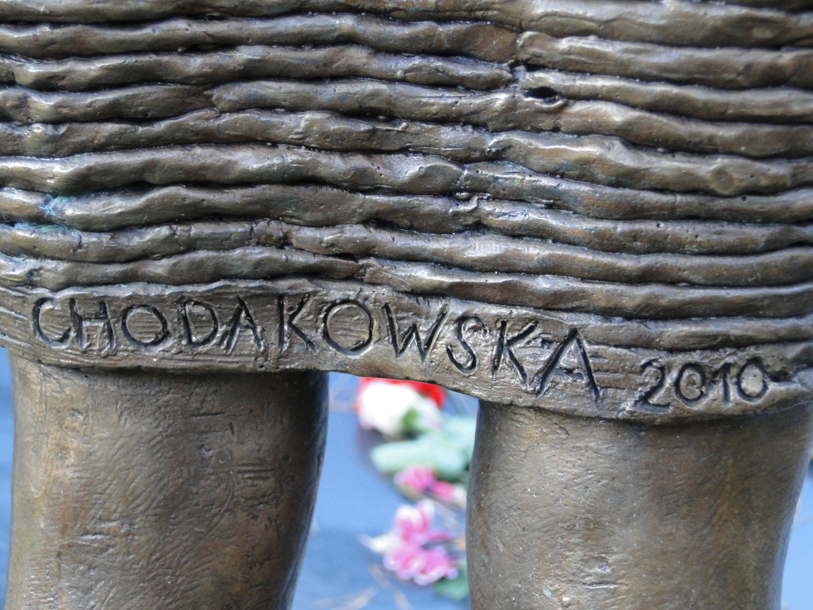 Malgorzata Chodakowska: Trauernden Mädchen am Tränenmeer, Signatur